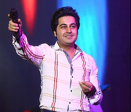 کنسرت موسیقی بهنام صفوی سه شنبه ۱۳ شهریور ۱۳۹۲ مرکز همایش های بین المللی برج میلاد تهران